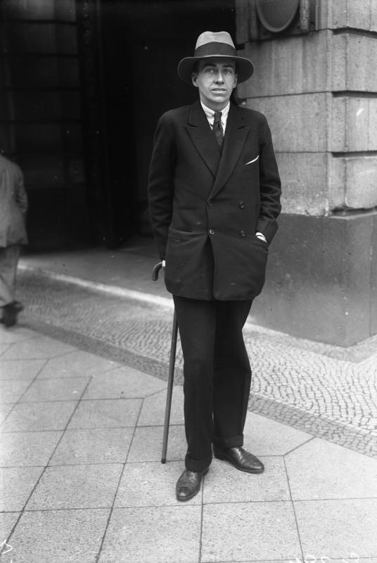 Cornelius Vanderbilt, Sohn des amerikanischen Multimillionärs Cornelius Vanderbilt [Text von Bild 102-05059] Cornelius Vanderbilt jr. der Sohn des amerikanischen Multimillionärs lässt sich scheiden. Als Grund seiner Scheidung gibt er an, dass seine Frau ihn "bei seiner Tätigkeit als Zeitungsherausgeber entmutigte". Cornelius Vanderbilt jr. der mit seinem Vermögen eine grosse Reihe von Zeitungen in Amerika gründete, hat bei diesen Unternehmungen sein ganzes Vermögen eingebüsst. Er soll sogar noch 12 Millionen Dollars Schulden haben.